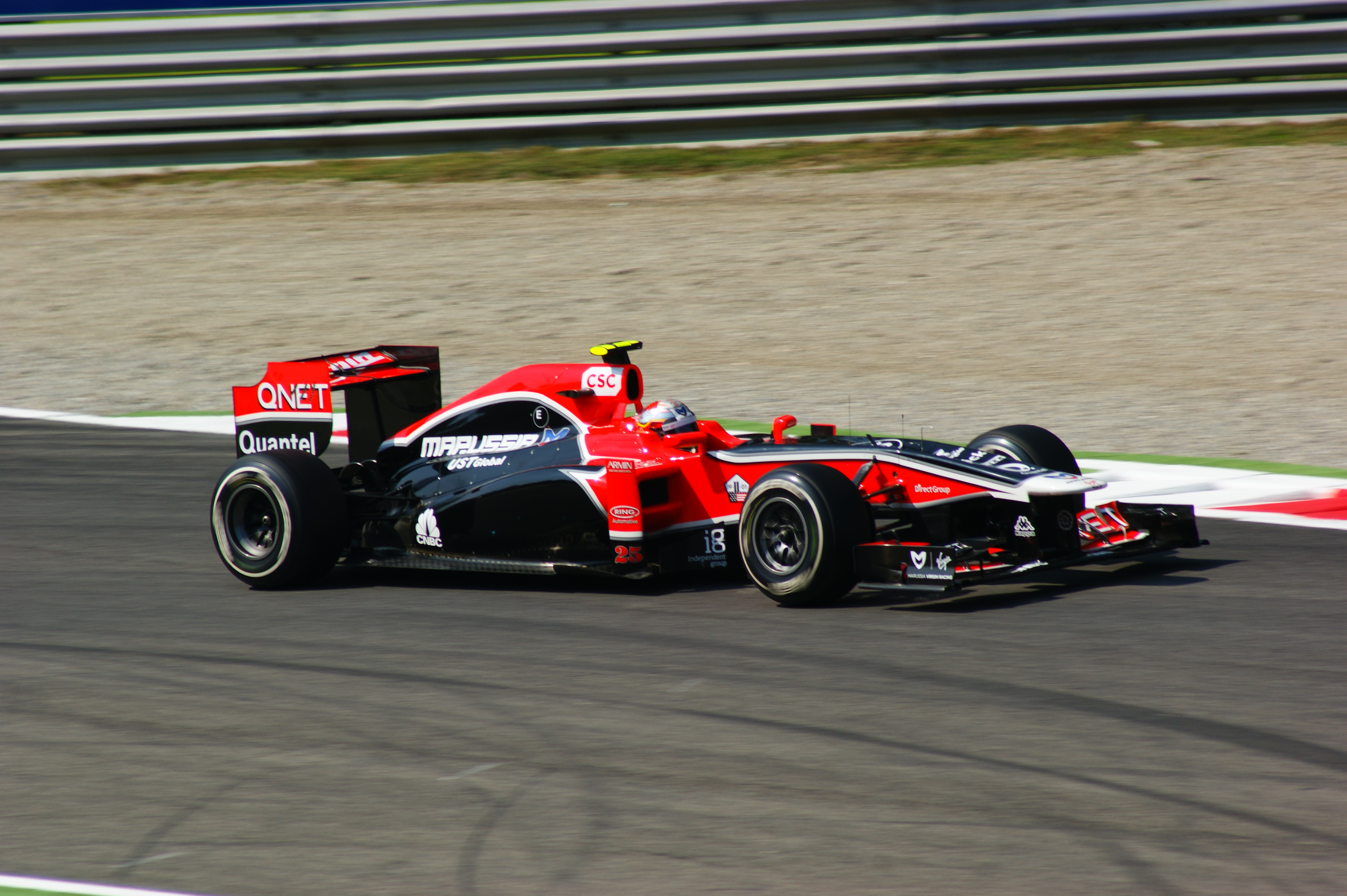 Jerome d'Ambrosio alla variante della roggia Monza 2011